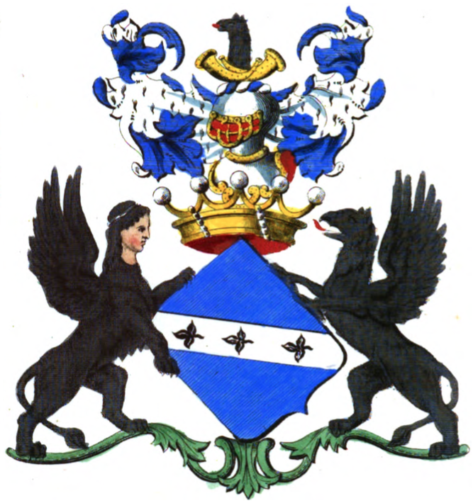 Armoiries de la famille Moreau de Bellaing